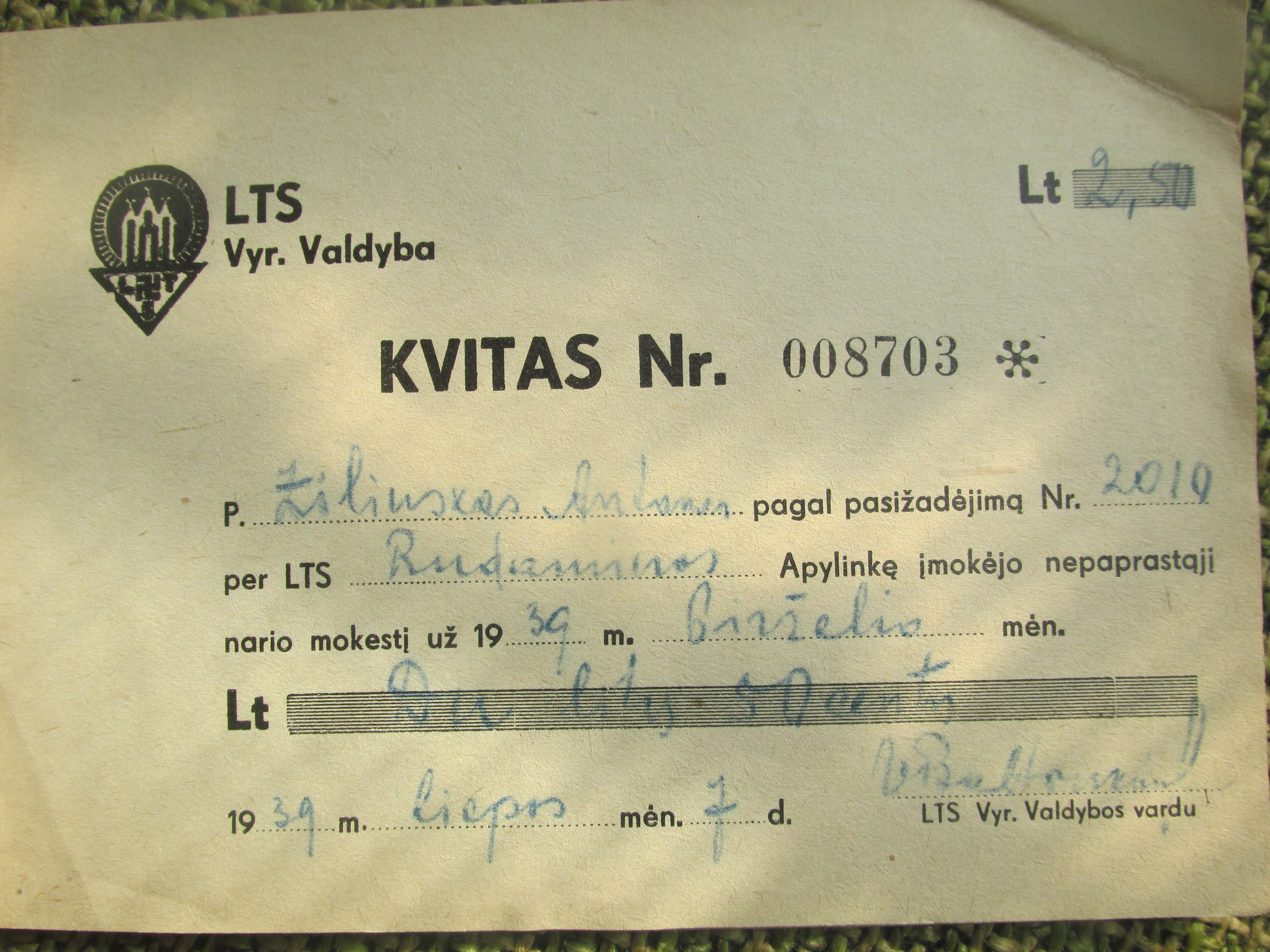 1939 m. birželio mėn. Lietuvių tautininkų sąjungos nario mokesčio kvitas. Sąjungos simbolyje yra svastika. Iš Petro Stankero rinkinio.